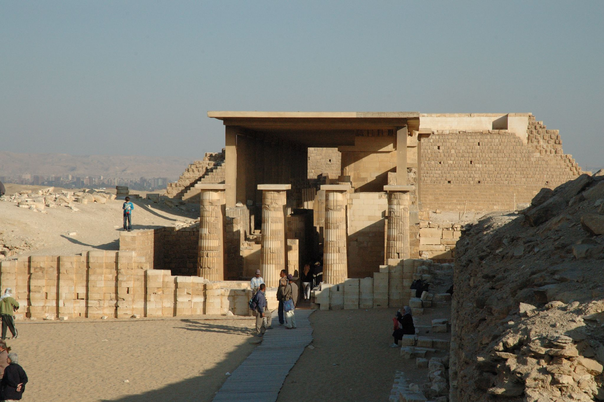 Saqqara: entrata al complesso di Zoser